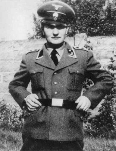 Deze foto, die de Blaricummer Pieter Menten voorstelt in een Duits SS-uniform uit de tweede wereldoorlog is een bedrieglijke truc-foto volgens de advocaat van Menten, Nederland 14 april 1977. 1941